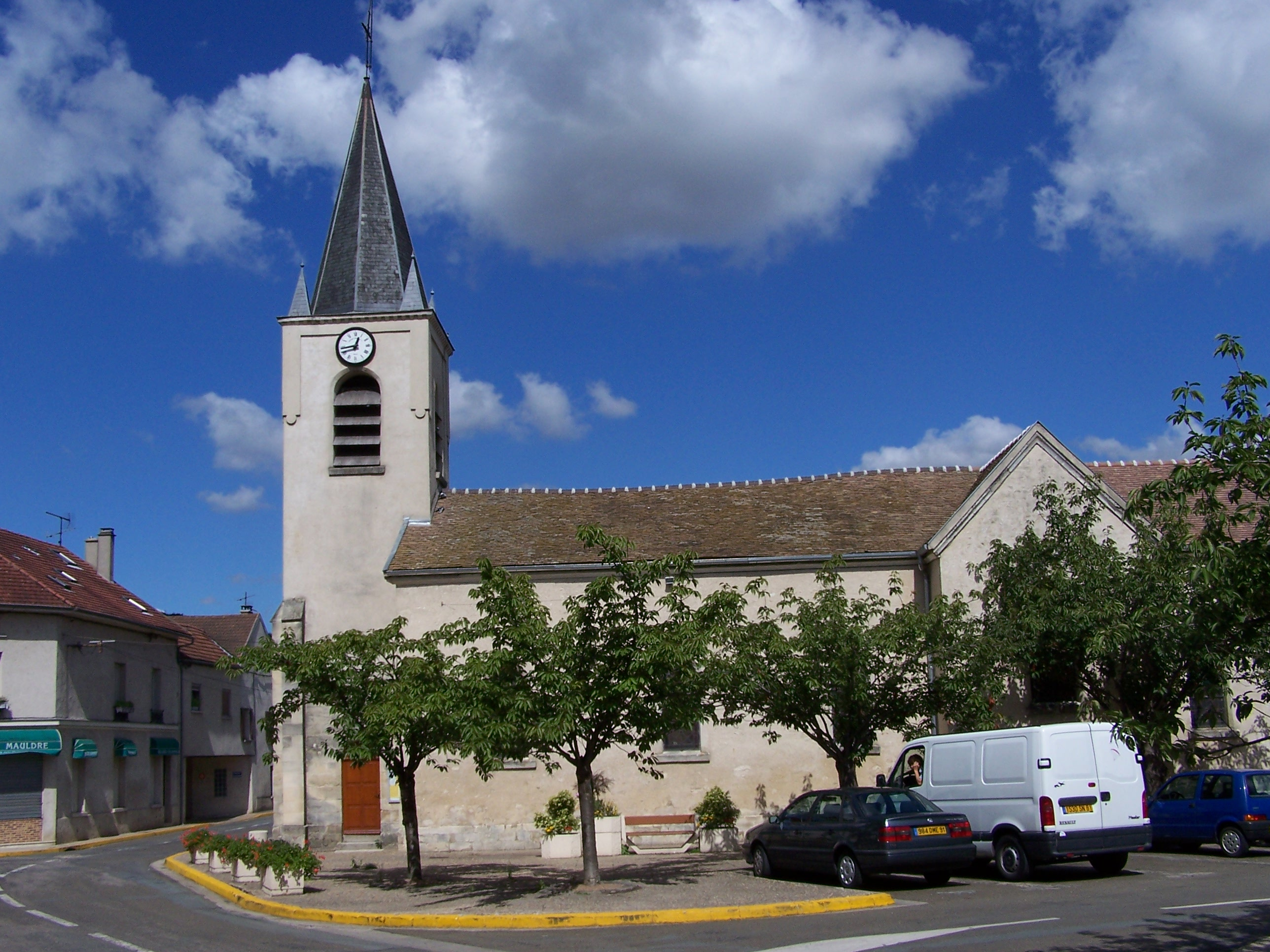 Église d'Aulnay-sur-Mauldre (Yvelines, France)